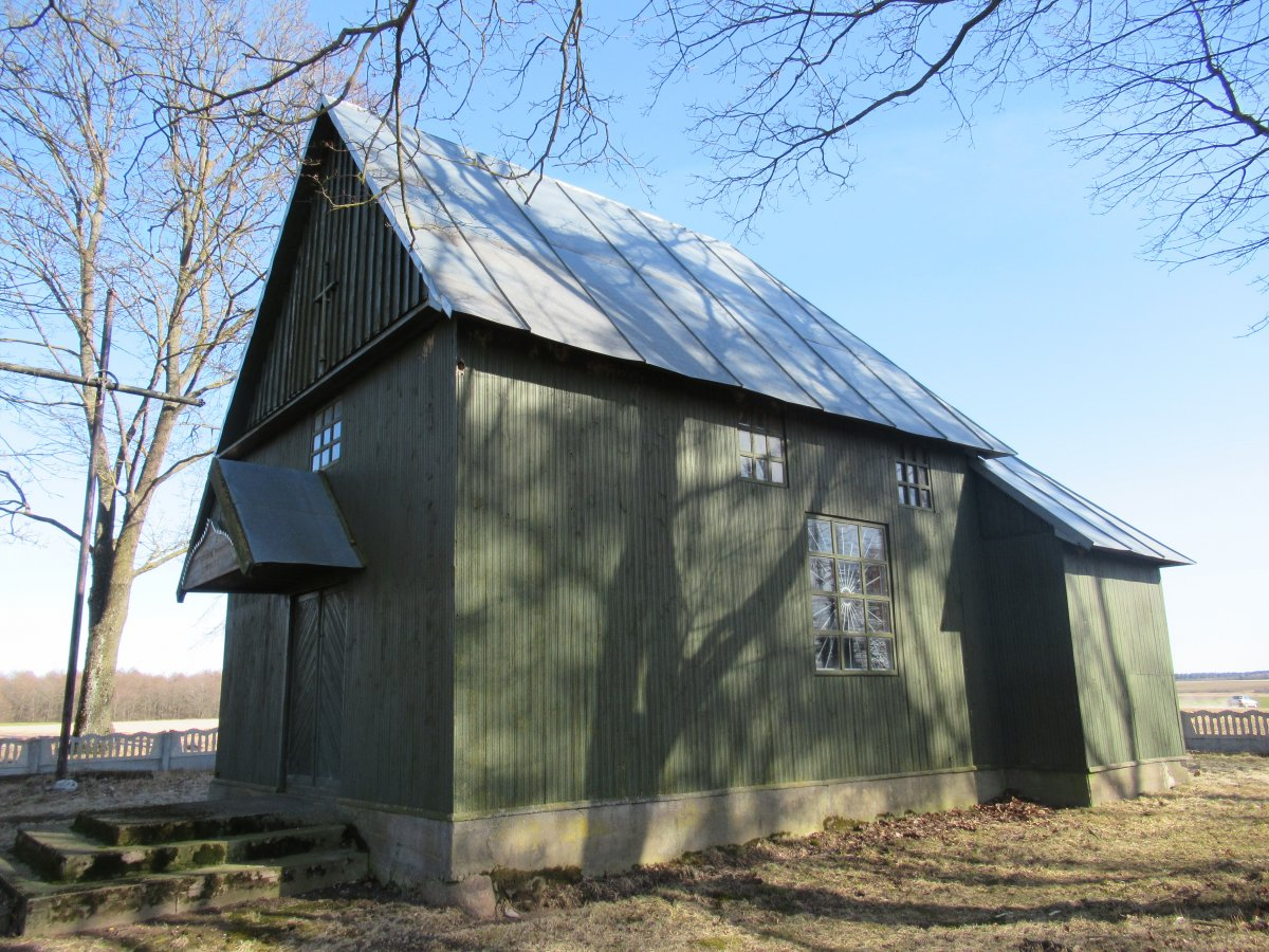 Пляшэвічы. Каталіцкая капліца на могілках